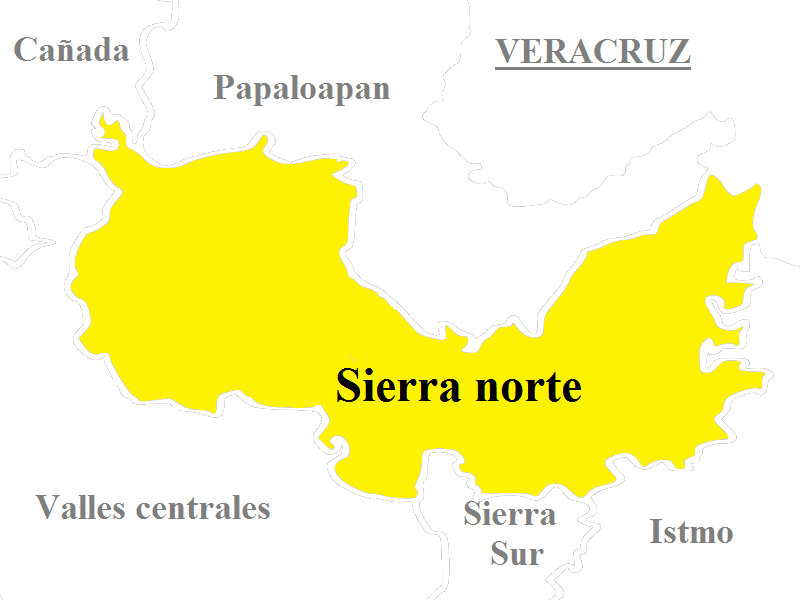 Región Sierra Norte, una de las ocho regiones que conforman al estado mexicano de Oaxaca.